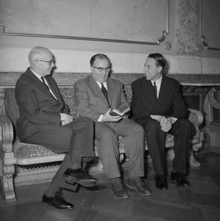 In der Wandelhalle des Schweizer Bundeshauses: Bundesrat Dr. Spühler, Nationalrat Rudolf Welter, Zürich und Bundesrat Prof. Tschudi (v.l.r.)